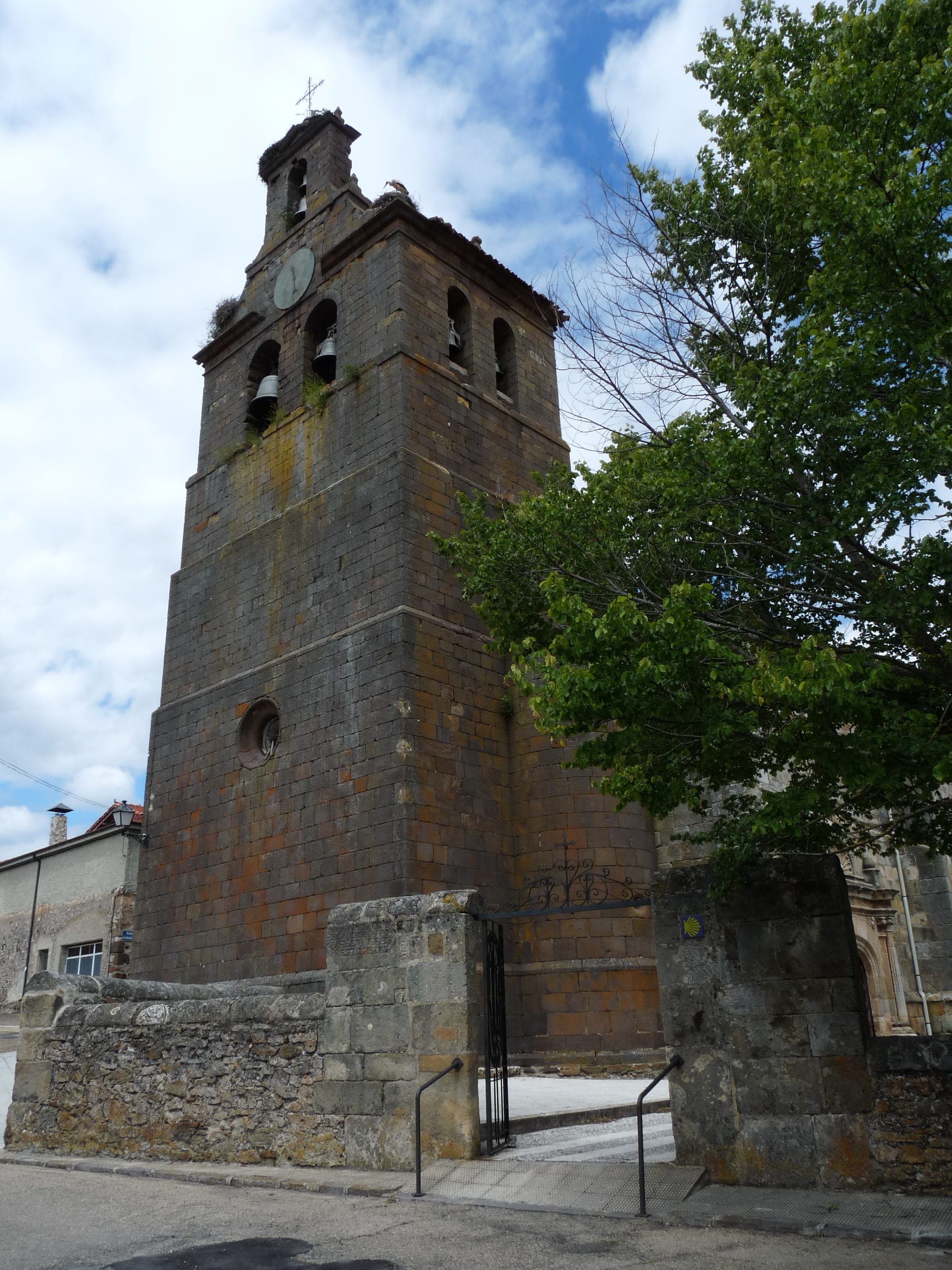 Abejar - Iglesia de San Juan Bautista s. XVI - Torre